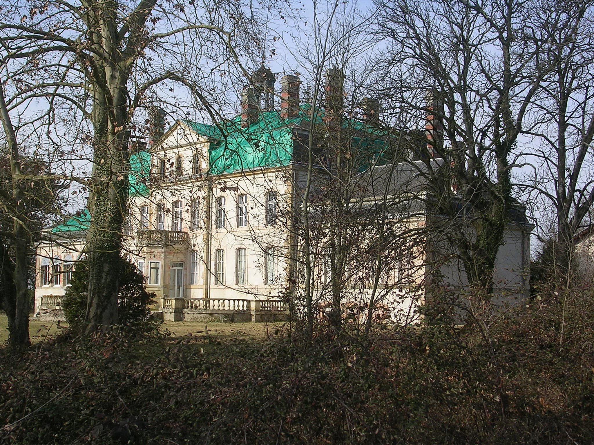 Le Vignau, château (Landes, France)